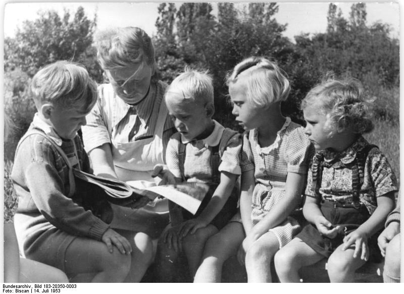 Magdeburg-Friedensweiler, Blick in den Kindergarten Zentralbild Biscan 14.7.1953 Ein Kindergarten für die Kinder von Genossenschaftsbauern Entsprechend den Vorschlägen des Politbüros der Sozialistischen Einheitspartei Deutschlands hat die Regierung zusätzliche 40 Millionen DM für Kindergärten, Feierabendheime, Ferienheime zur Verfügung gestellt. Zu den in der letzten Zeit neuerrichteten Kindergärten gehört die Kindertagesstätte in Magdeburg-Friedenweiler, die hauptsächlich für die Kinder der Mitglieder der Landwirtschaftlichen Produktionsgenossenschaft Friedensweiler und der Arbeiter des Karl-Marx-Werkes gedacht ist. Dieser neue Kindergarten nimmt besonders den Genossenschaftsbäuerinnen während der Erntezeit manche Arbeit ab. UBz: Kindergärtnerin Anita Kasch, die Leiterin des Kindergartens, erzählt den Kindern von den Tieren im zoologischen Garten, den sie demnächst besuchen werden. Die Mutti von Jürgen (4. von rechts) und Karin Völlmer (2. von rechts) hilft zur Zeit bei der Einbringung der Ernte der LPG Friedensweiler.